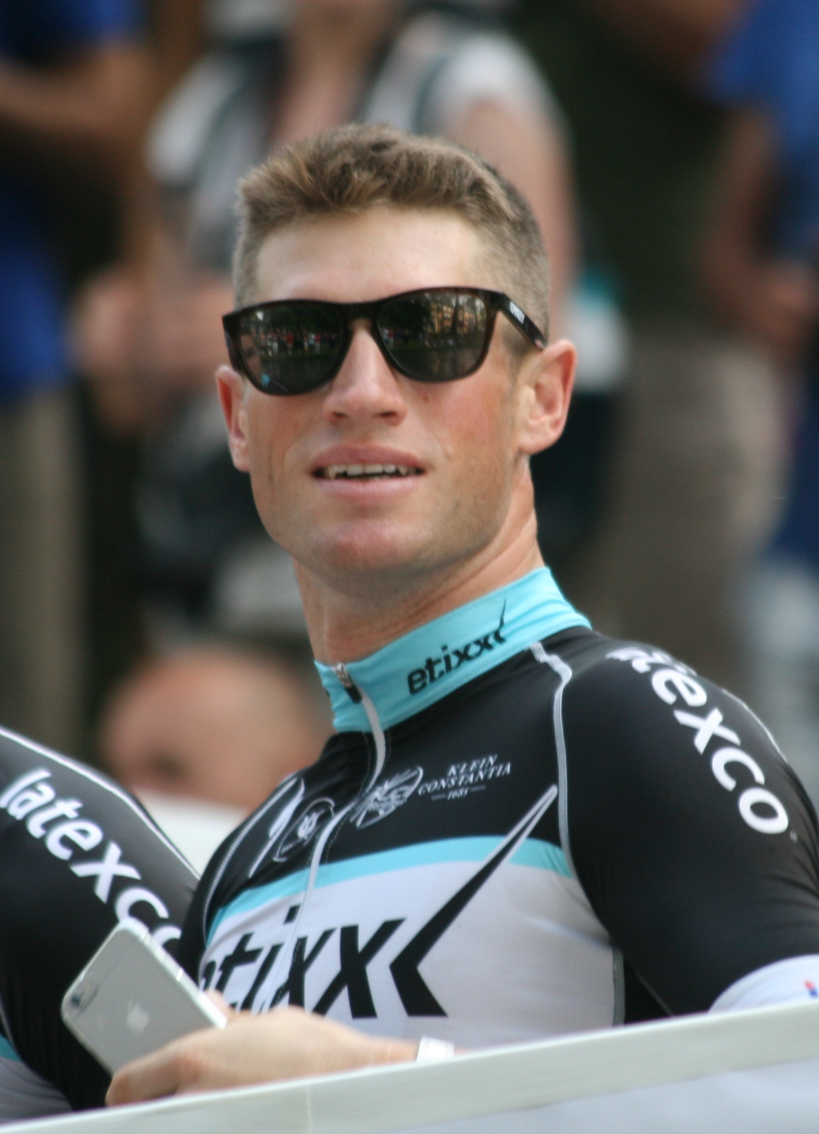 ploegenpresentatie Tour de France 2015 Utrecht